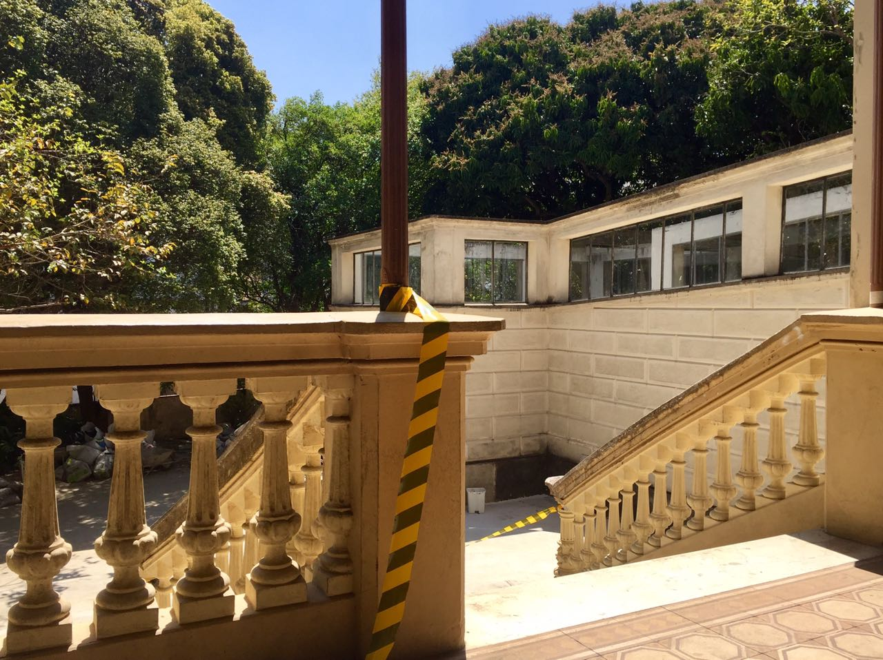 Escadaria aos fundos da Casa de Dona Yayá, em São Paulo (SP), Brasil